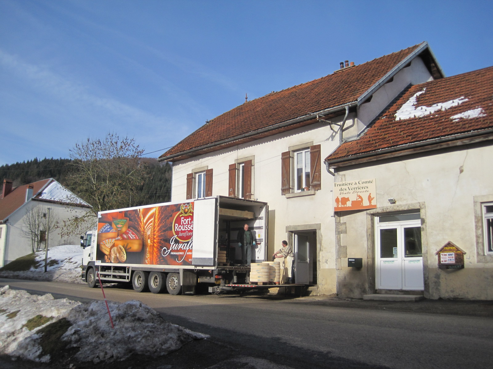 En Franche-Comté, la fruitière à comté des Verrières vend sa production de fromage : enlèvement par le camion de la société Fromageries Arnaud Frères